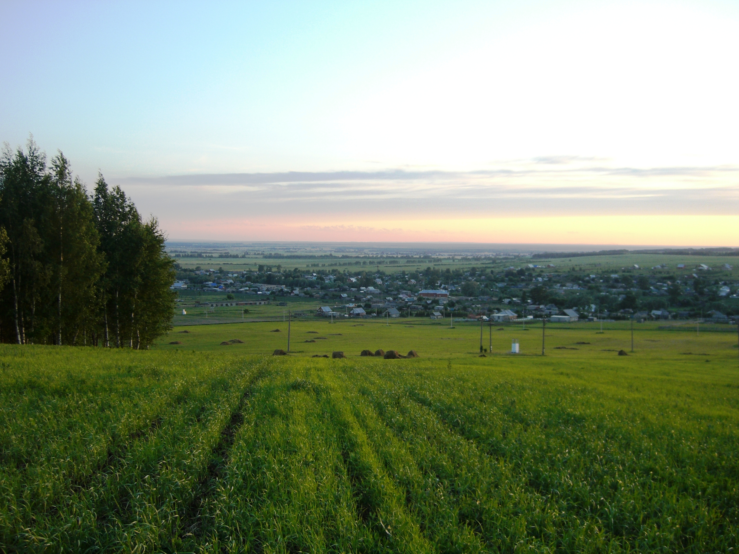 Вид на д. Новый Актанышбаш